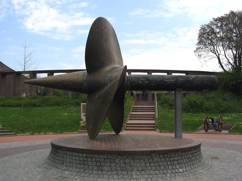 Beschreibung: Prinz Eugen / Schraube Fotograf: Darkone, 1. Mai 2004